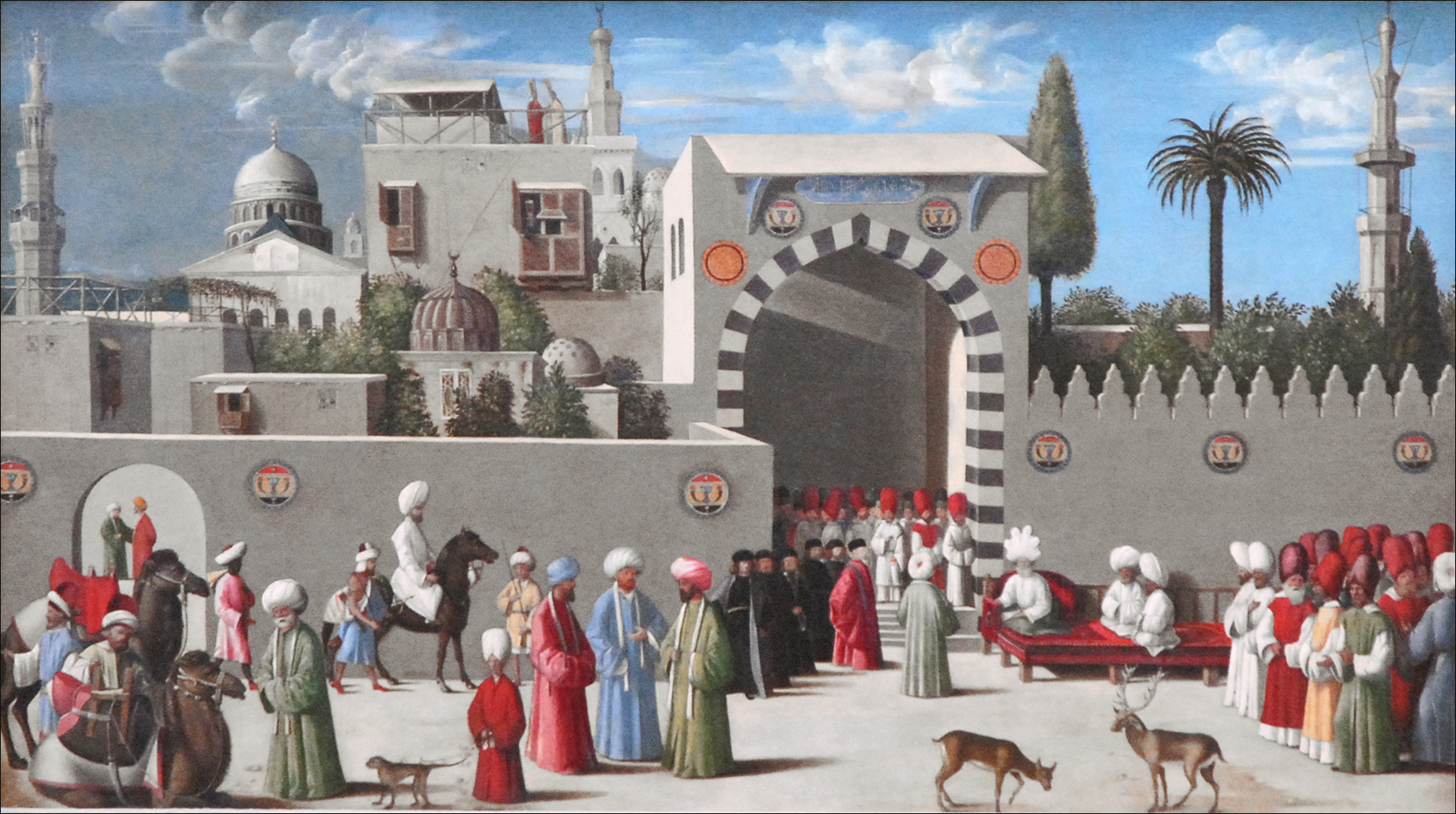 La Réception d’une délégation vénitienne à Damaslabel QS:Lfr,"La Réception d’une délégation vénitienne à Damas"